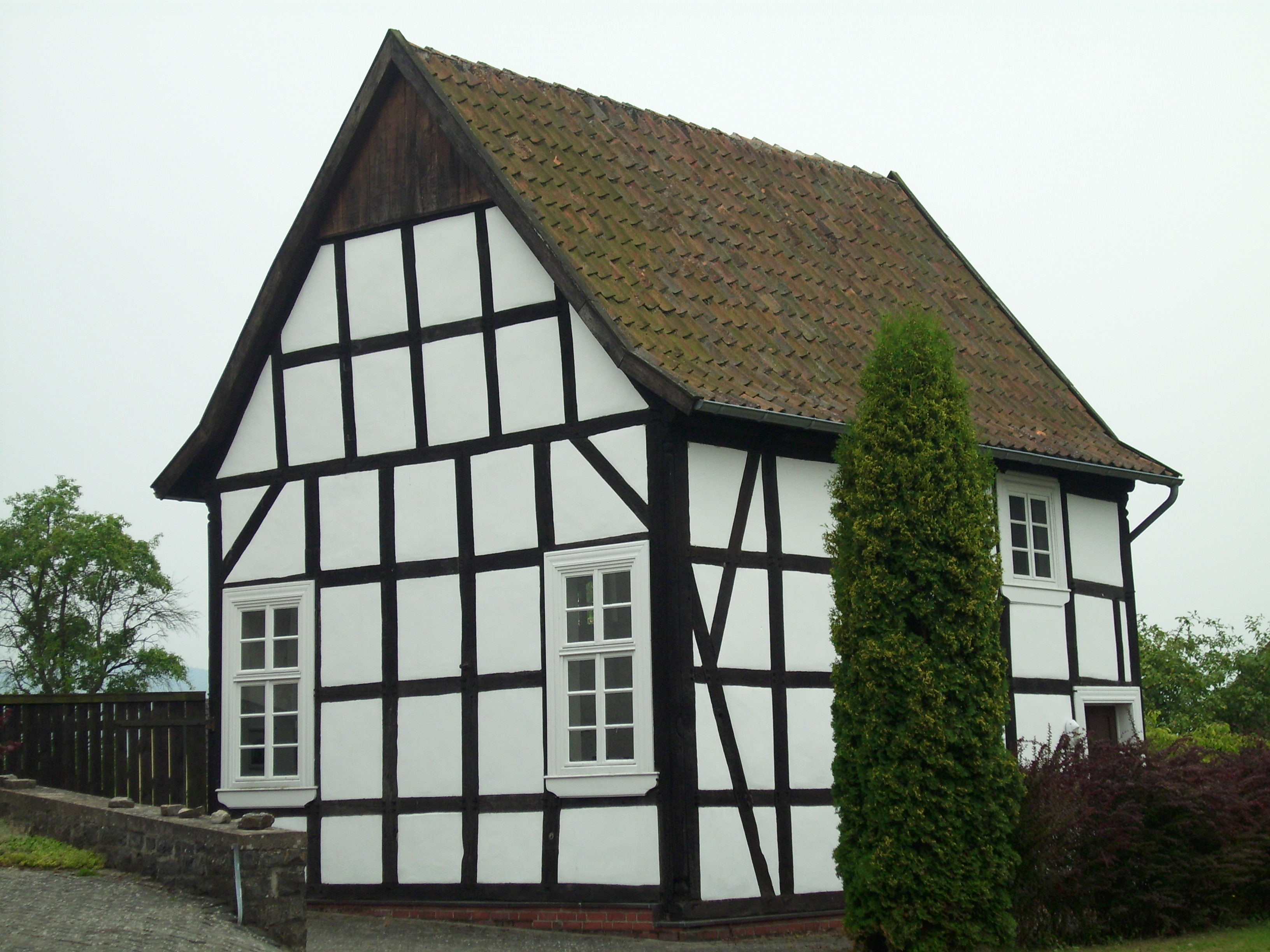 Marsberg-Padberg (Hochsauerlandkreis), ehemalige Synagoge